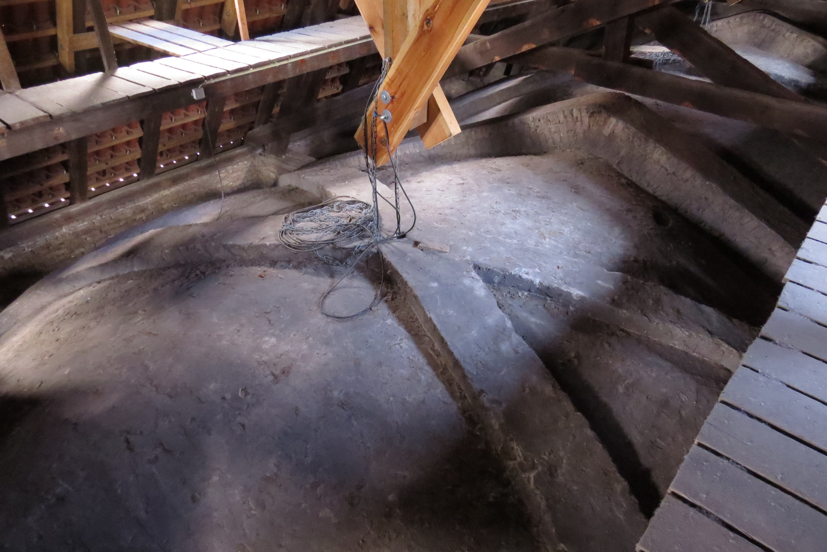 Kirche St. Georg, Berlin-Pankow, die drei Fenster in der Altarapsis